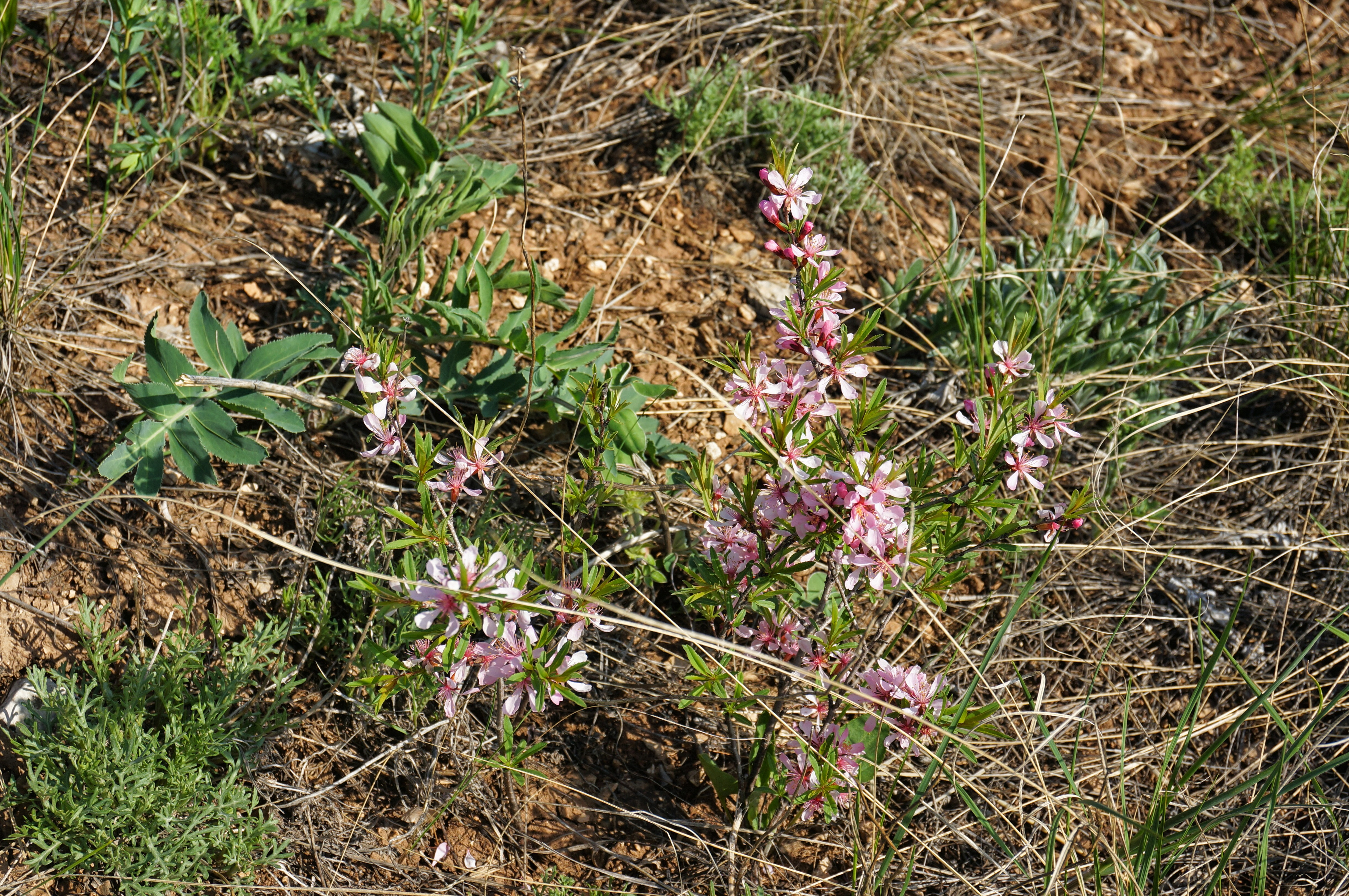 Овраг Верховой, Кинельский район, Самарская область, Россия This image is related to the protected area of Russia number 6310830